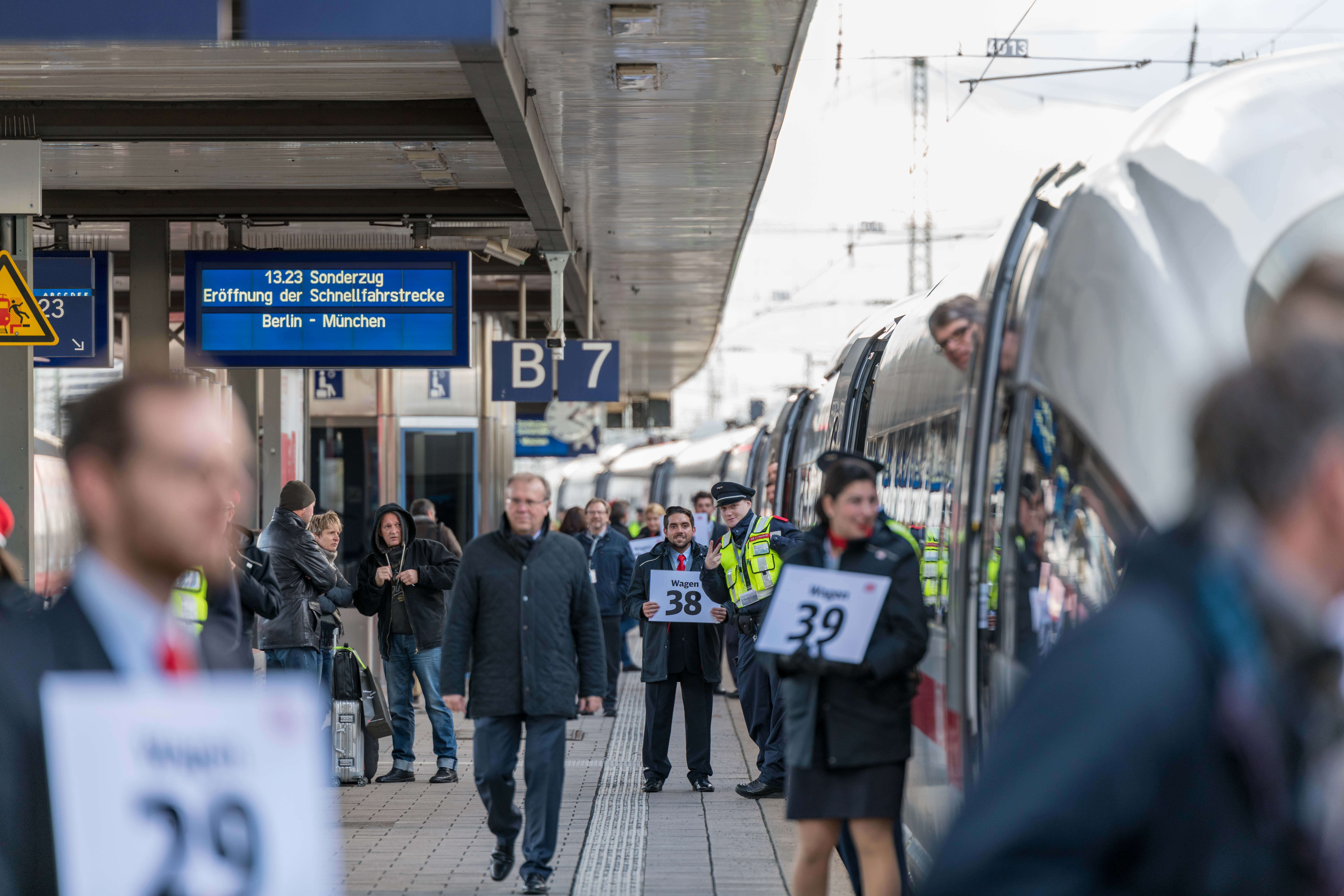 Verkehrsprojekt Deutsche Einheit Nr. 8, Sonderzug von München nach Berlin am Eröffnungstag 8.12.2017 hier in Nürnberg Hbf